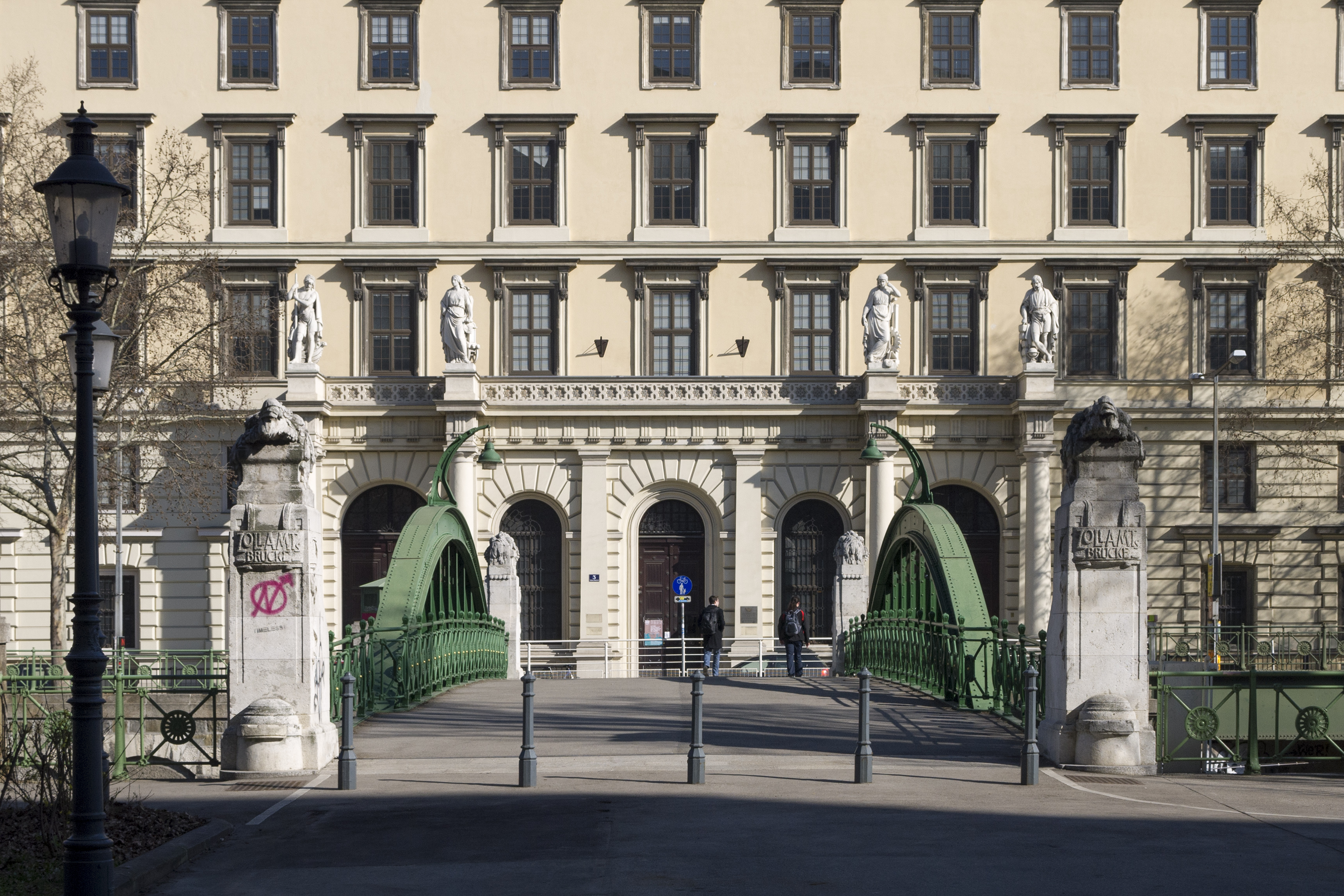 Ehem. Finanzlandesdirektion